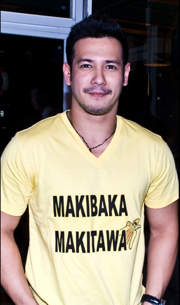 Prats in 2013.